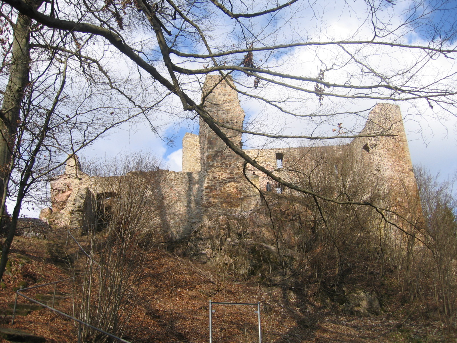 Burgruine Schwärzenberg bei Strahlfeld